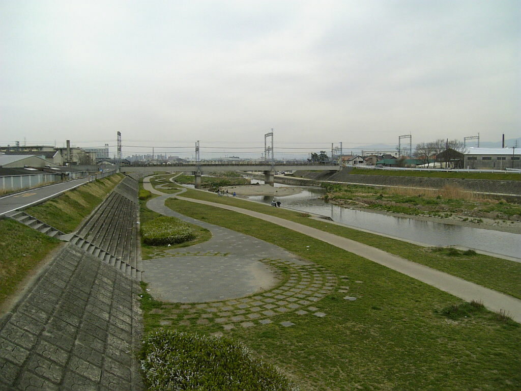 大津川（大阪府泉大津市）